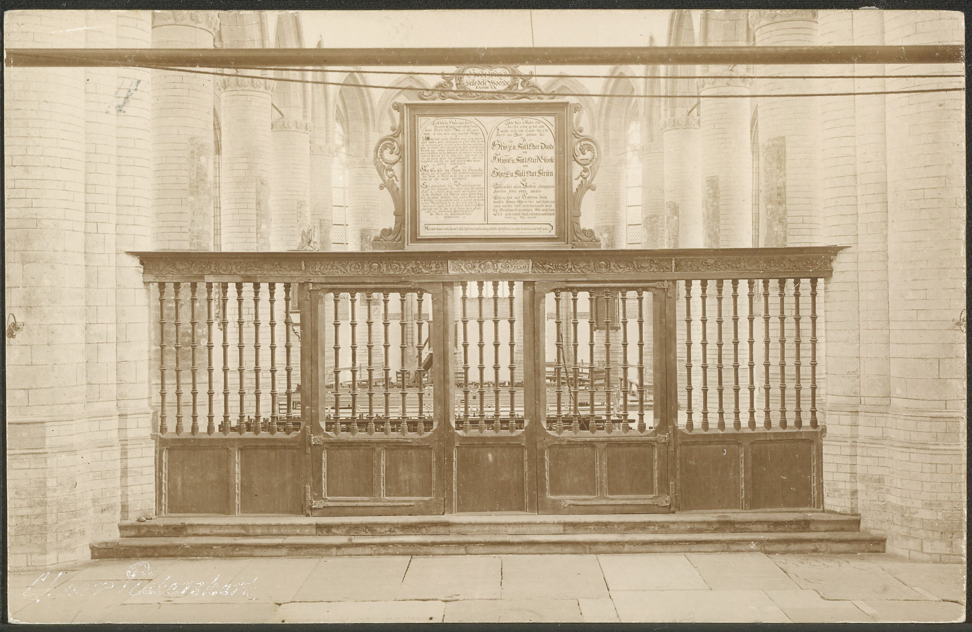 Zicht op het koorhek van de Pieterskerk.